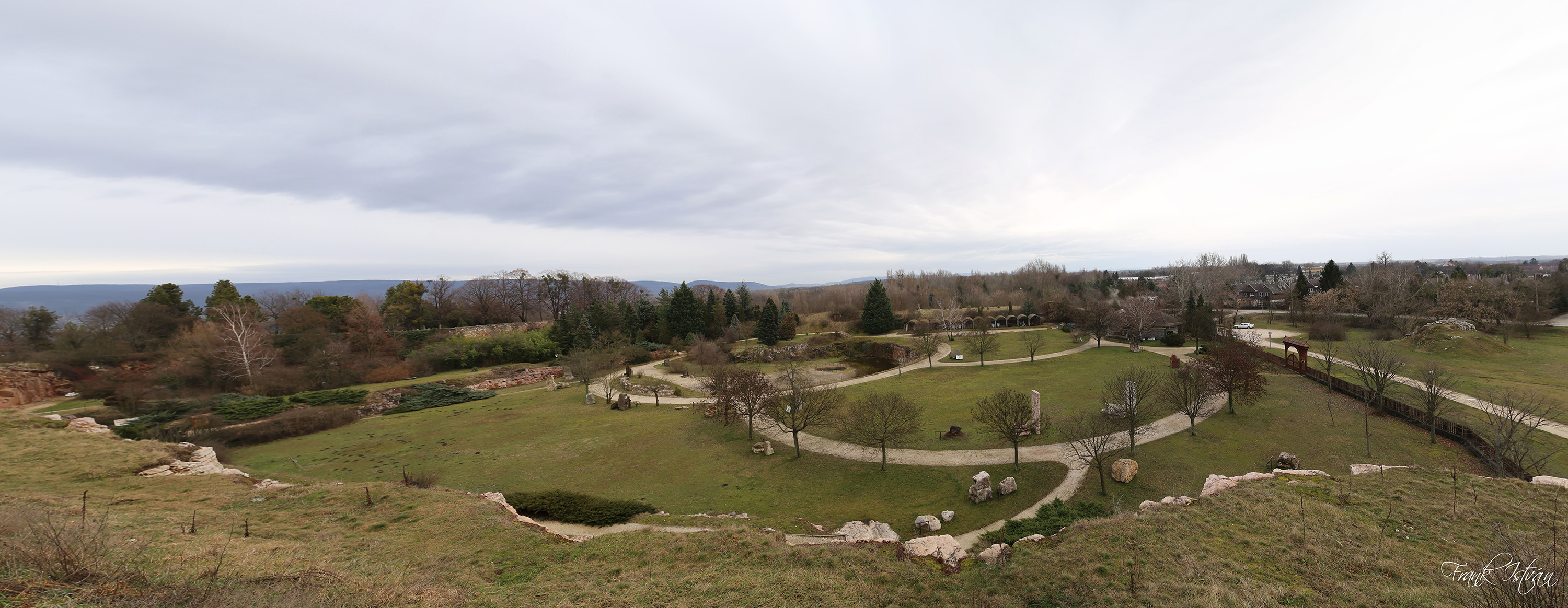 Panoráma a tatai Kálvária-dombról